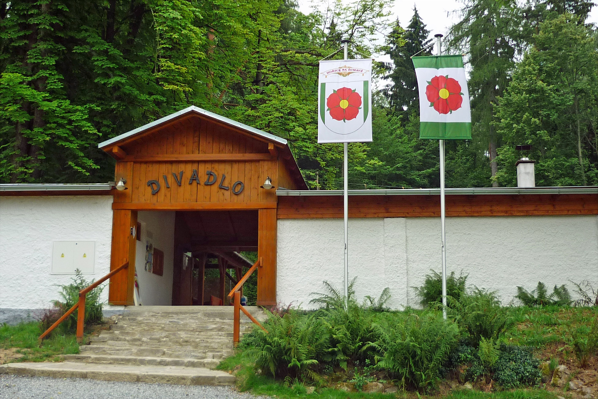 Passionsspieltheater in Höritz (Hořice na Šumavě) im Böhmerwald